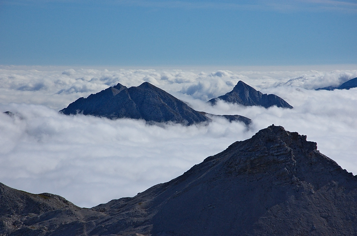 Mrzli Vrh